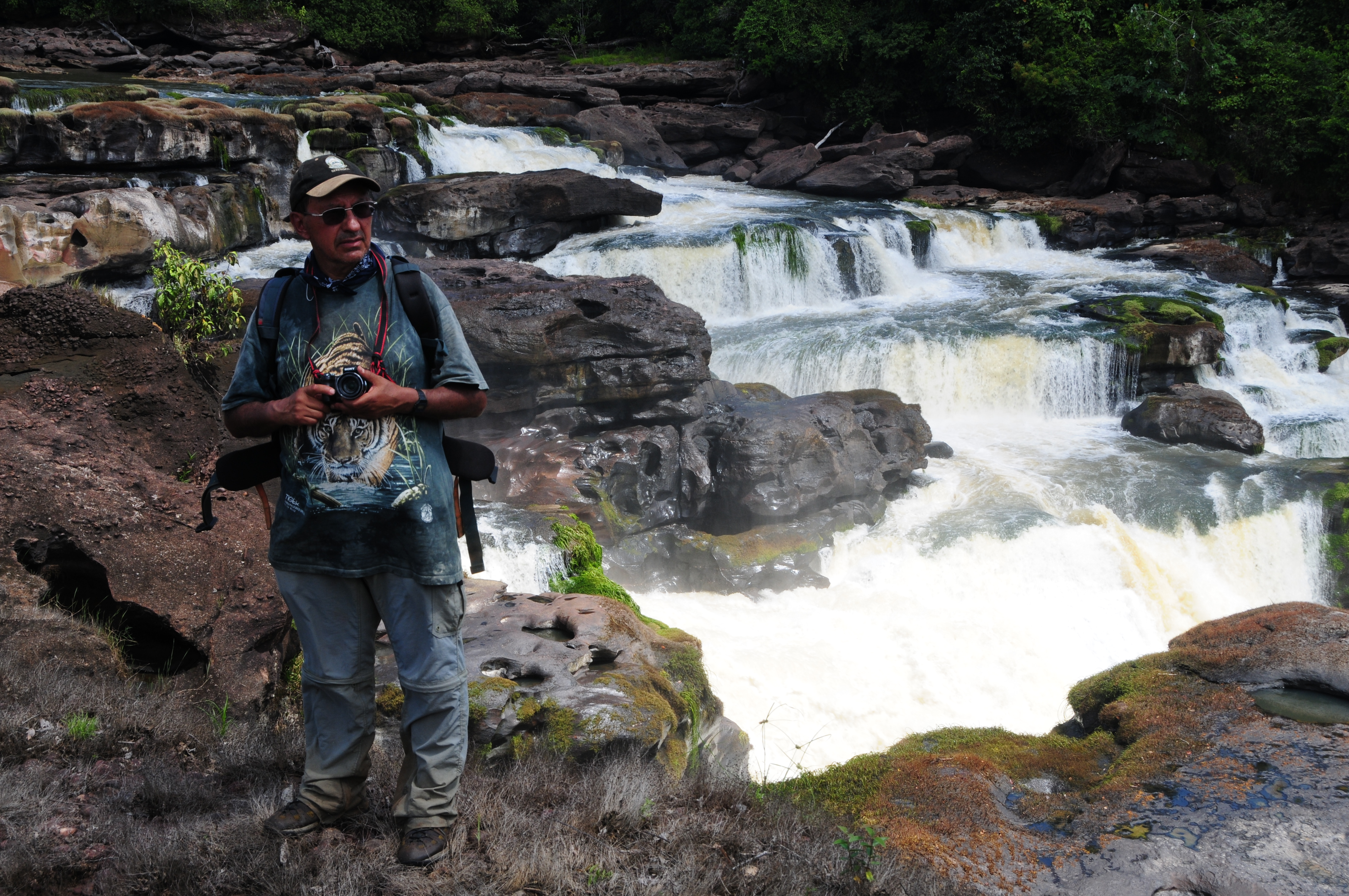 Andrés Hurtado García